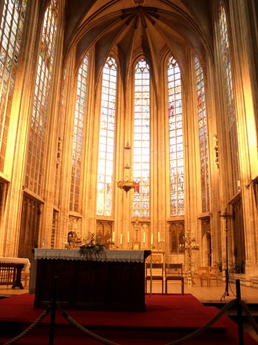 Brussel·les - Notre-Dame du Sablon - Altar